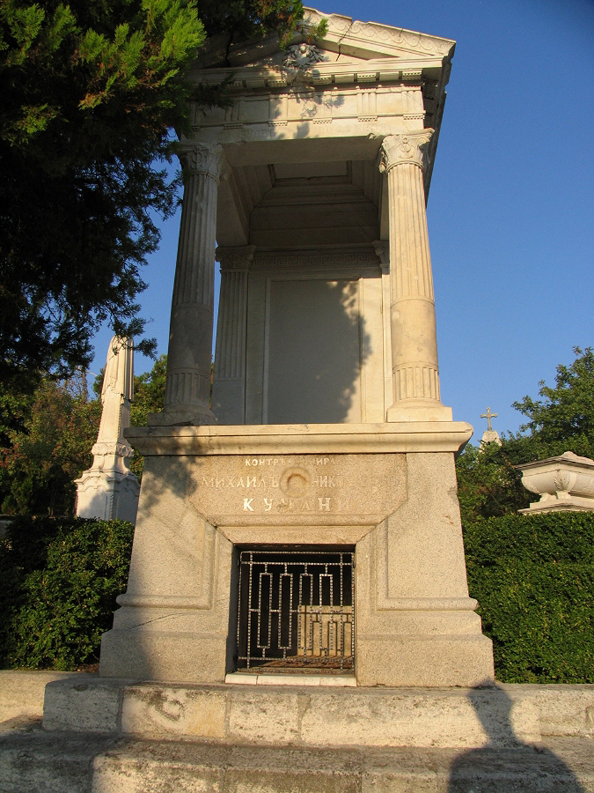 Мавзолей контр-адмирала Михаила Николаевича Кумани в Севастополе.jpg